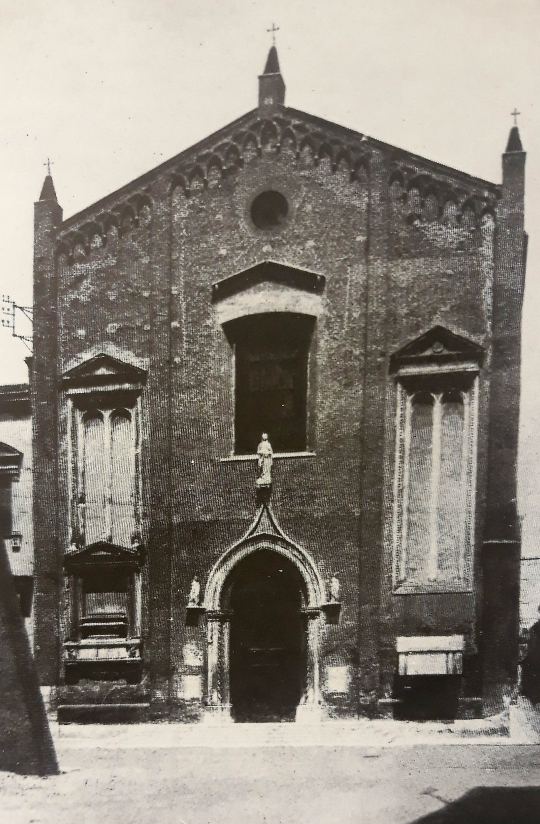 Facciata della chiesa di santa Eufemia a Verona in una foto del 1938. Si noti la grande finestra centrale realizzata nel settecento e sostituita da un rosone nel 1945